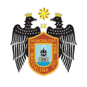 Escudo de armas del distrito de Magdalena del Mar.